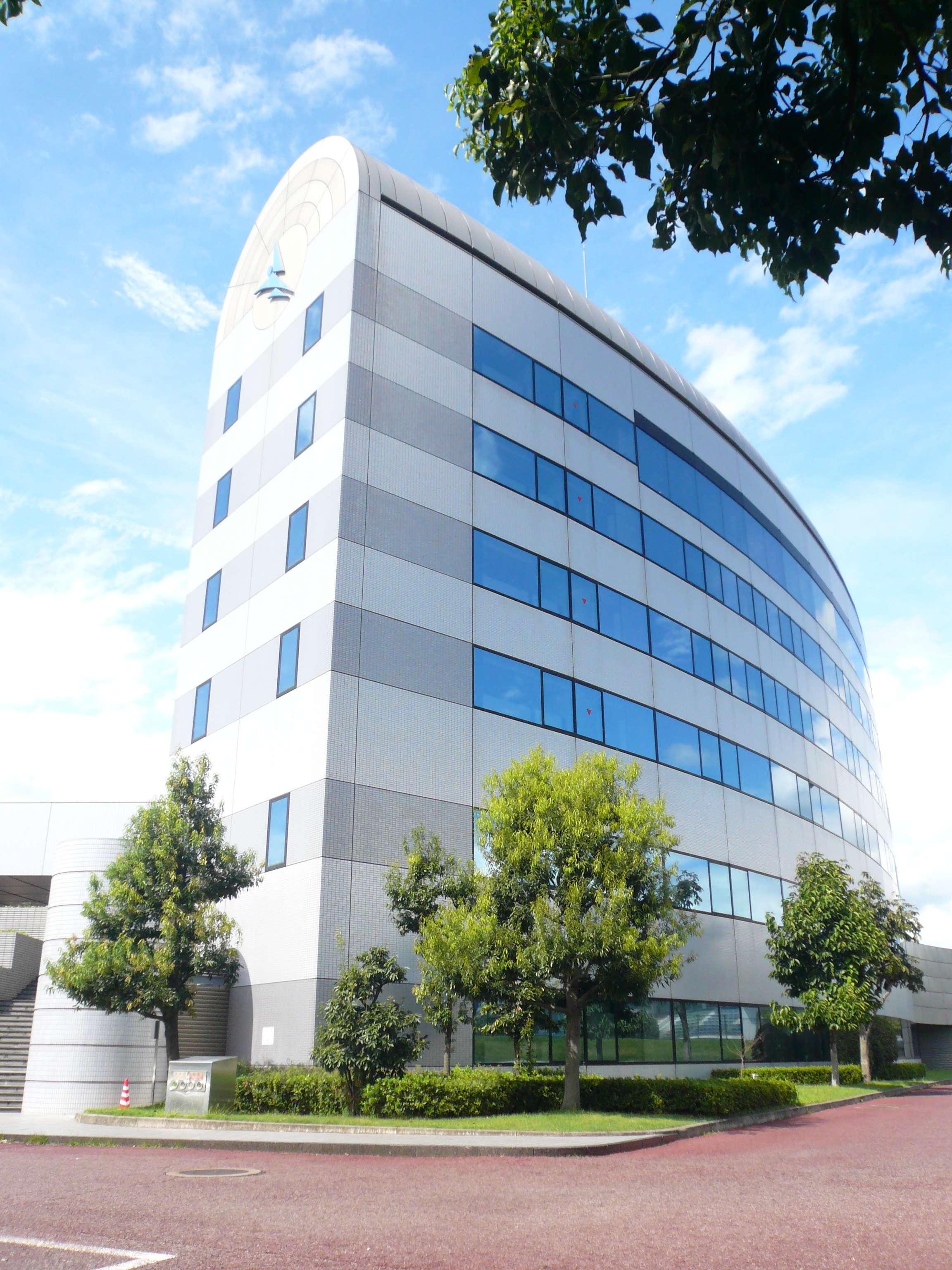 Nagaragawa Sports Plaza（長良川スポーツプラザ）,Gifu,Gifu(岐阜県岐阜市)で撮影。